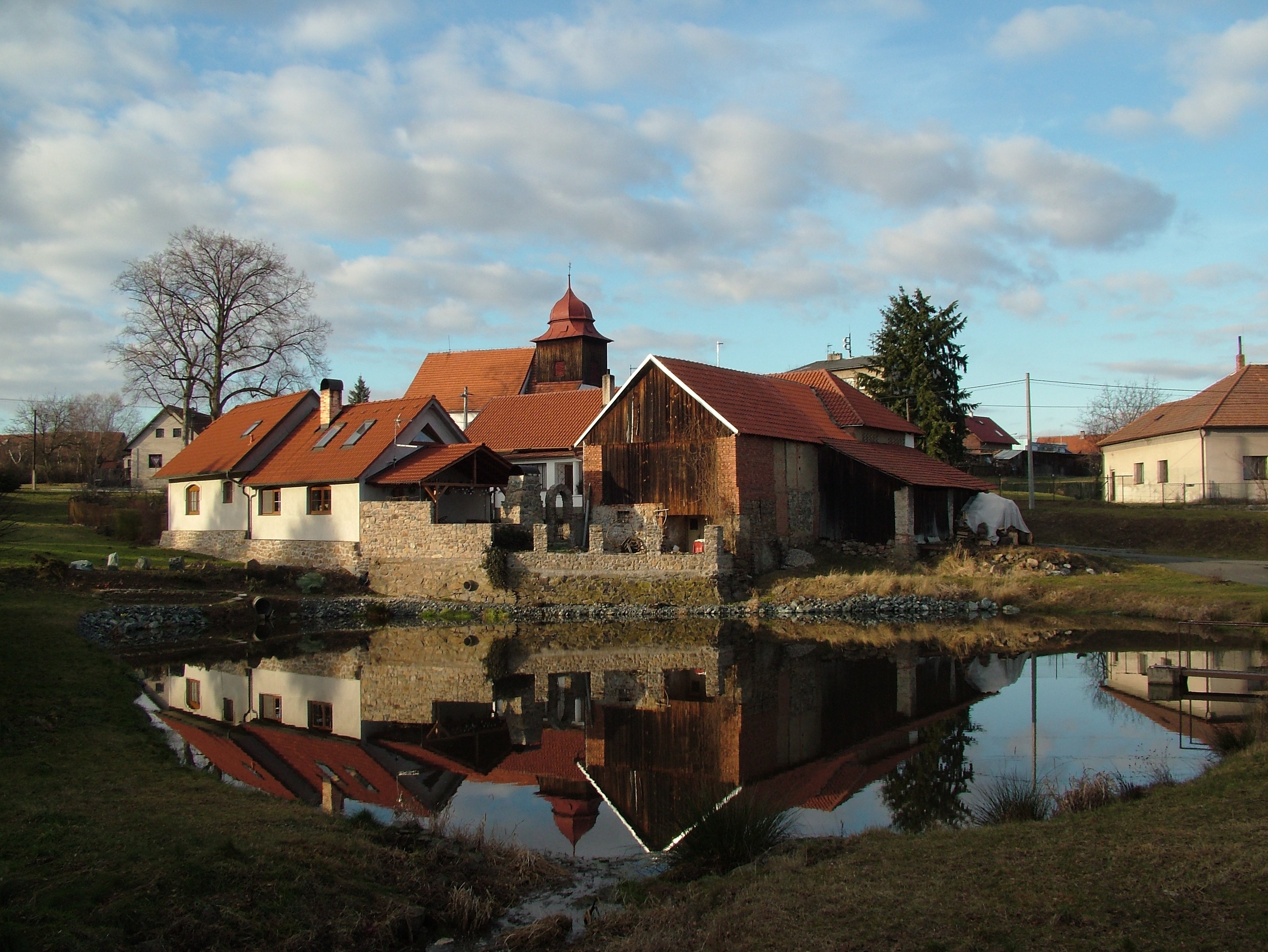 Tehov, okres Benešov.